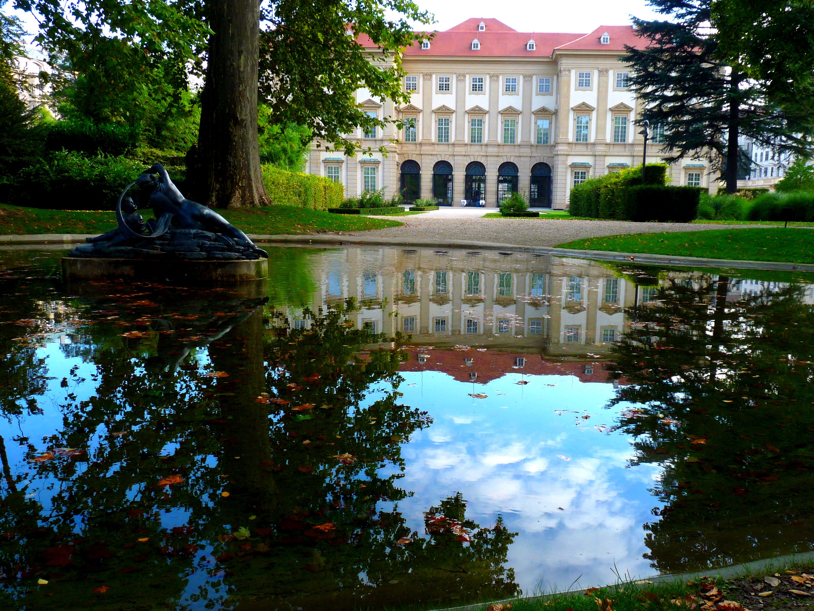 Brunnennymphe mit Putto